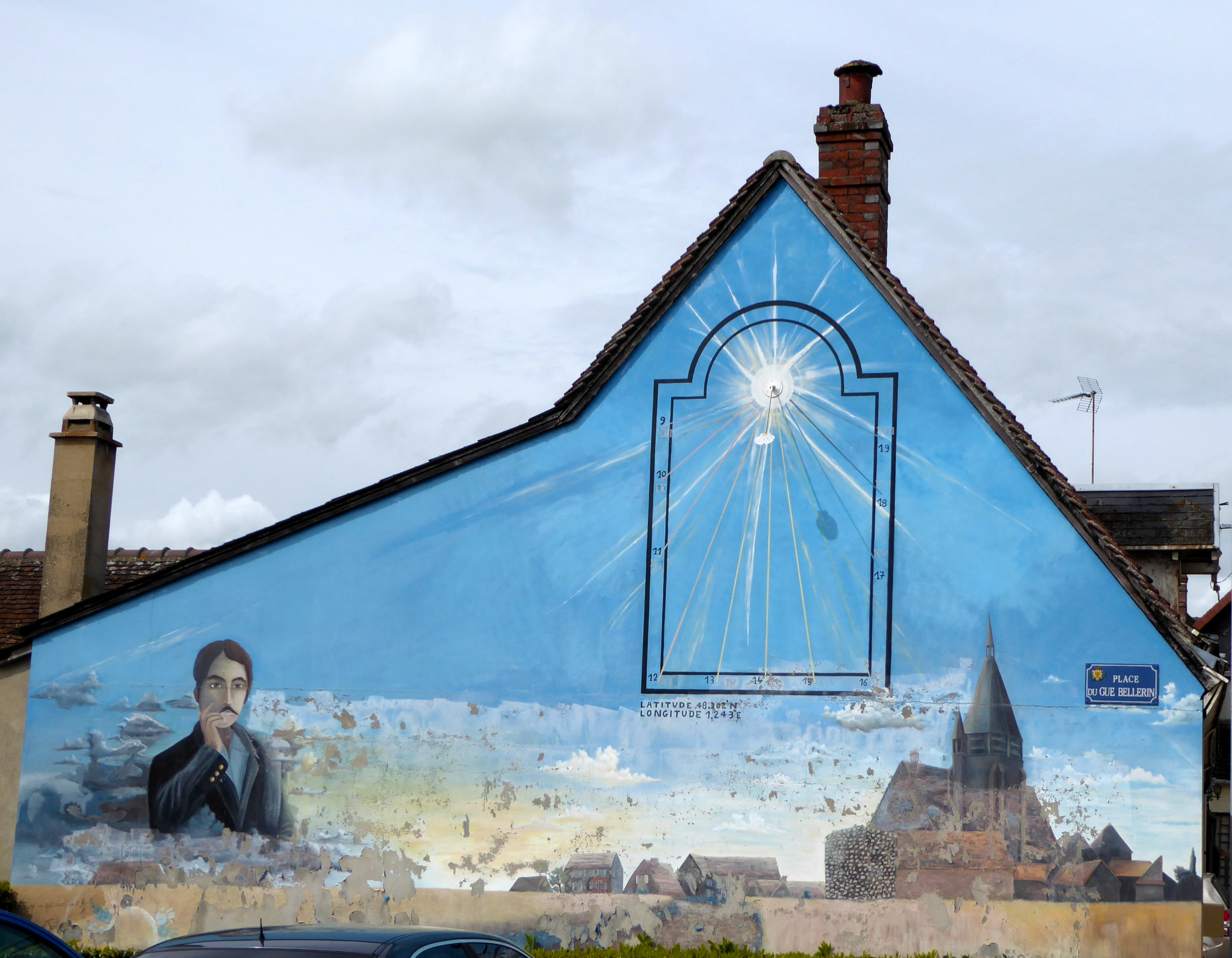 Peinture murale en hommage à Marcel Proust, place du gué Bellerin, Illiers-Combray, Eure-et-Loir (France).